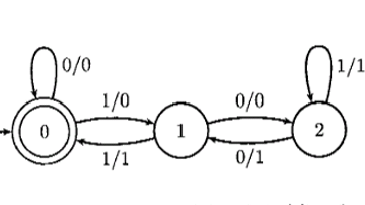 Srpski (latinica): Трансдуктор за дељење са 3 у бинарној основи